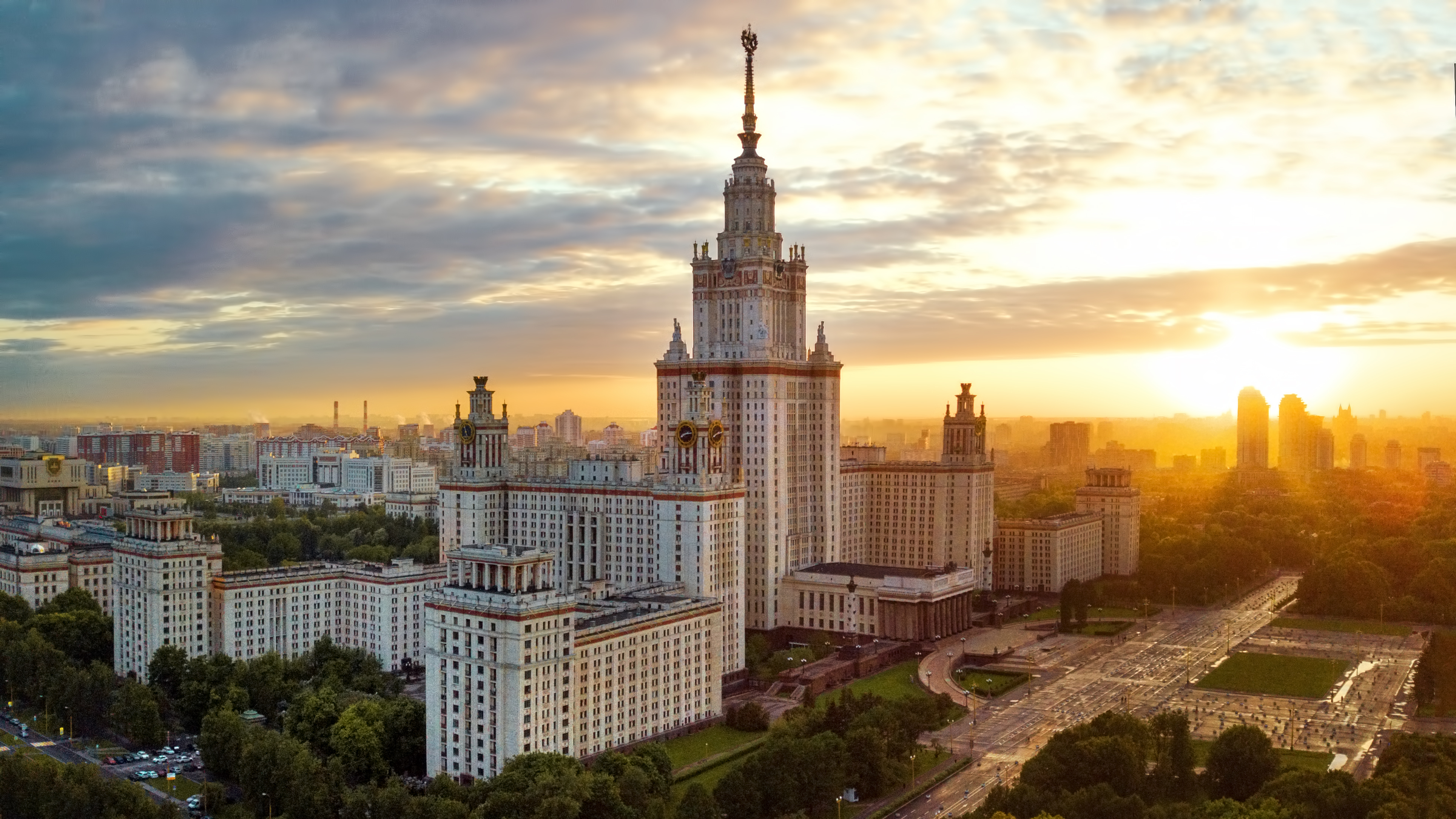 Изображено главное здание МГУ. Май. Тихий весенний закат.